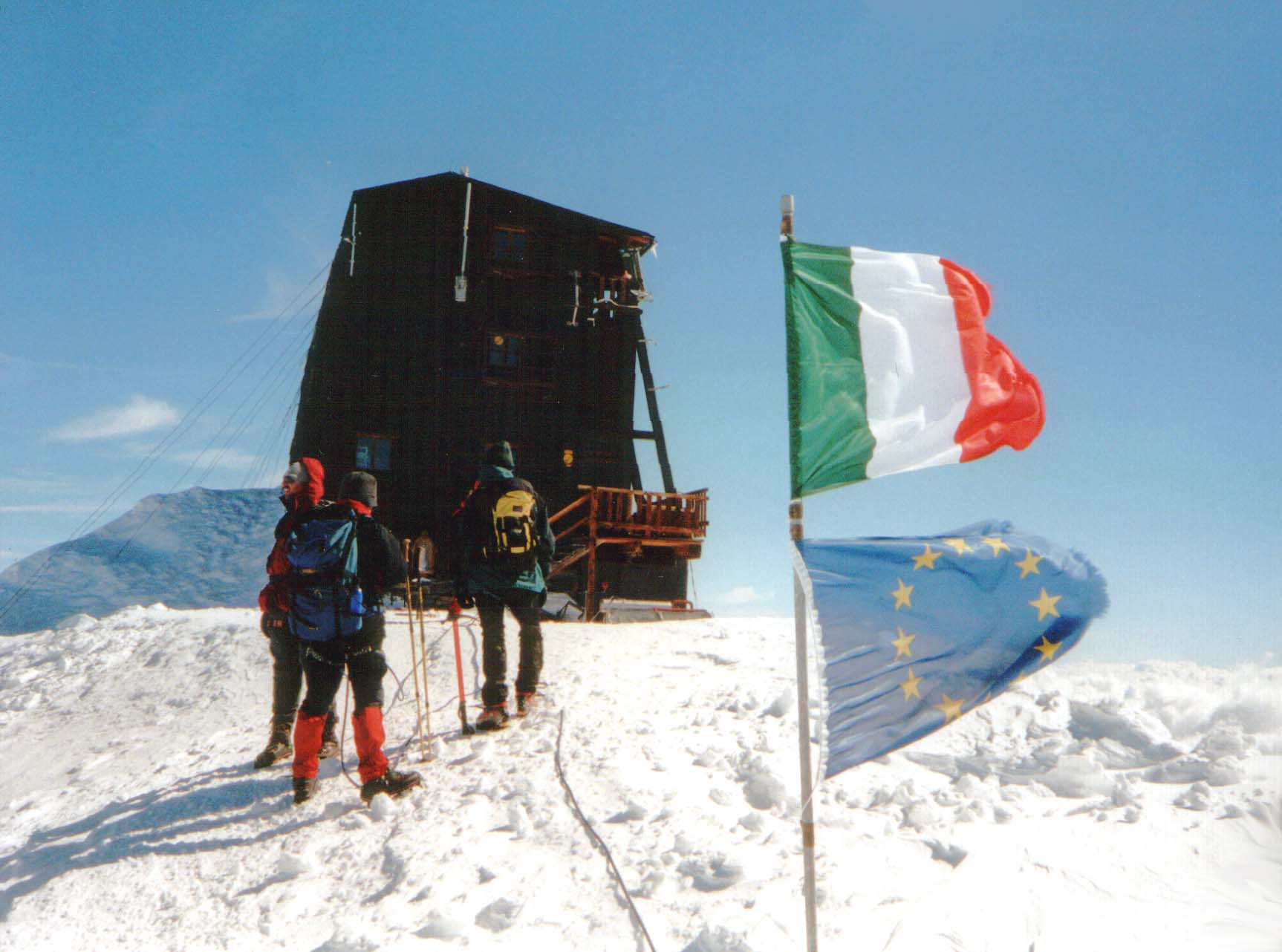 Capanna Regina Margherita Selbst fotografiert am 2. August 2002 Fotograf: Hejkal